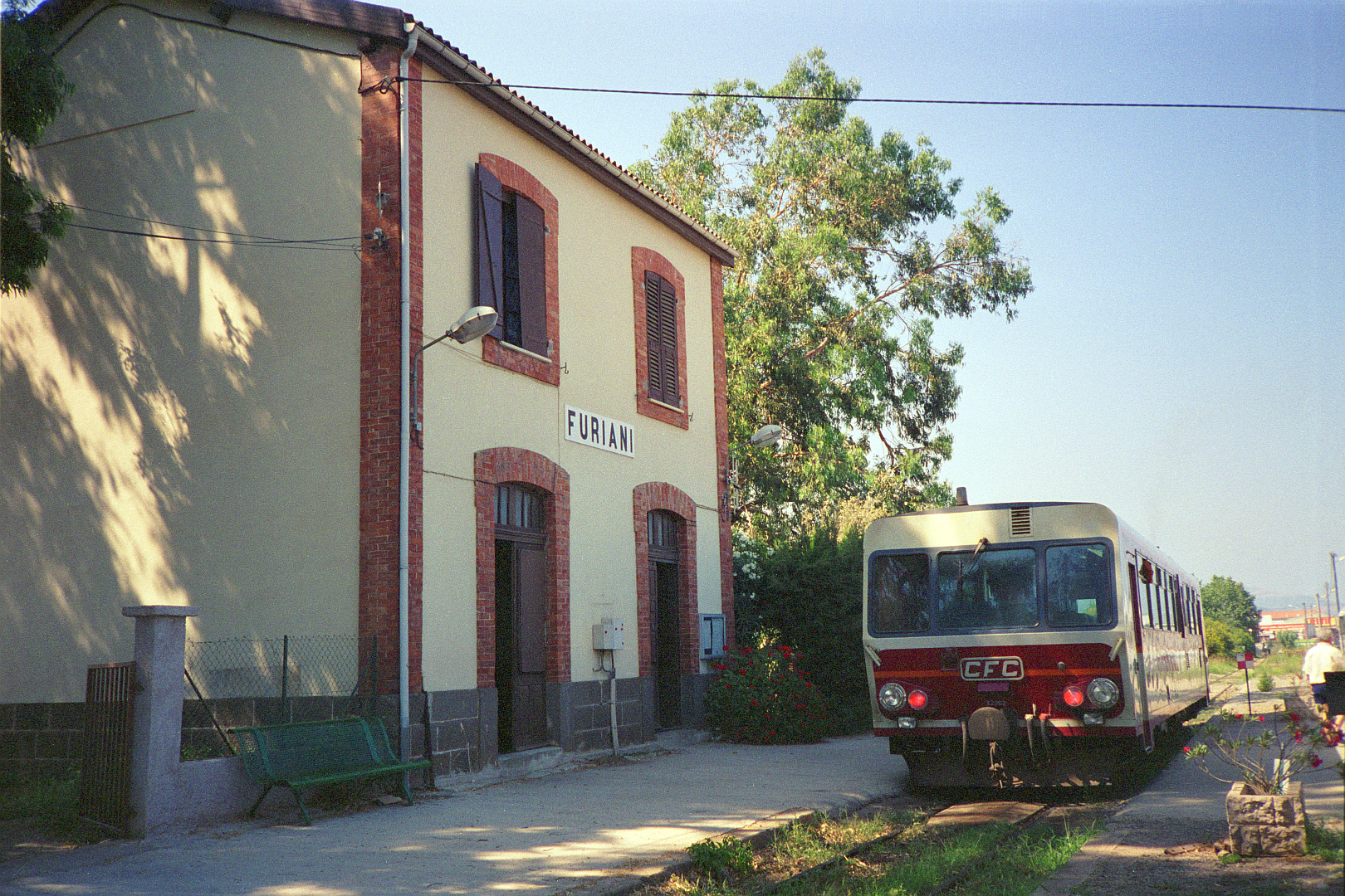 L'autorail X 2002 des chemins de fer de la Corse en gare de Furiani le 5 août 1994.